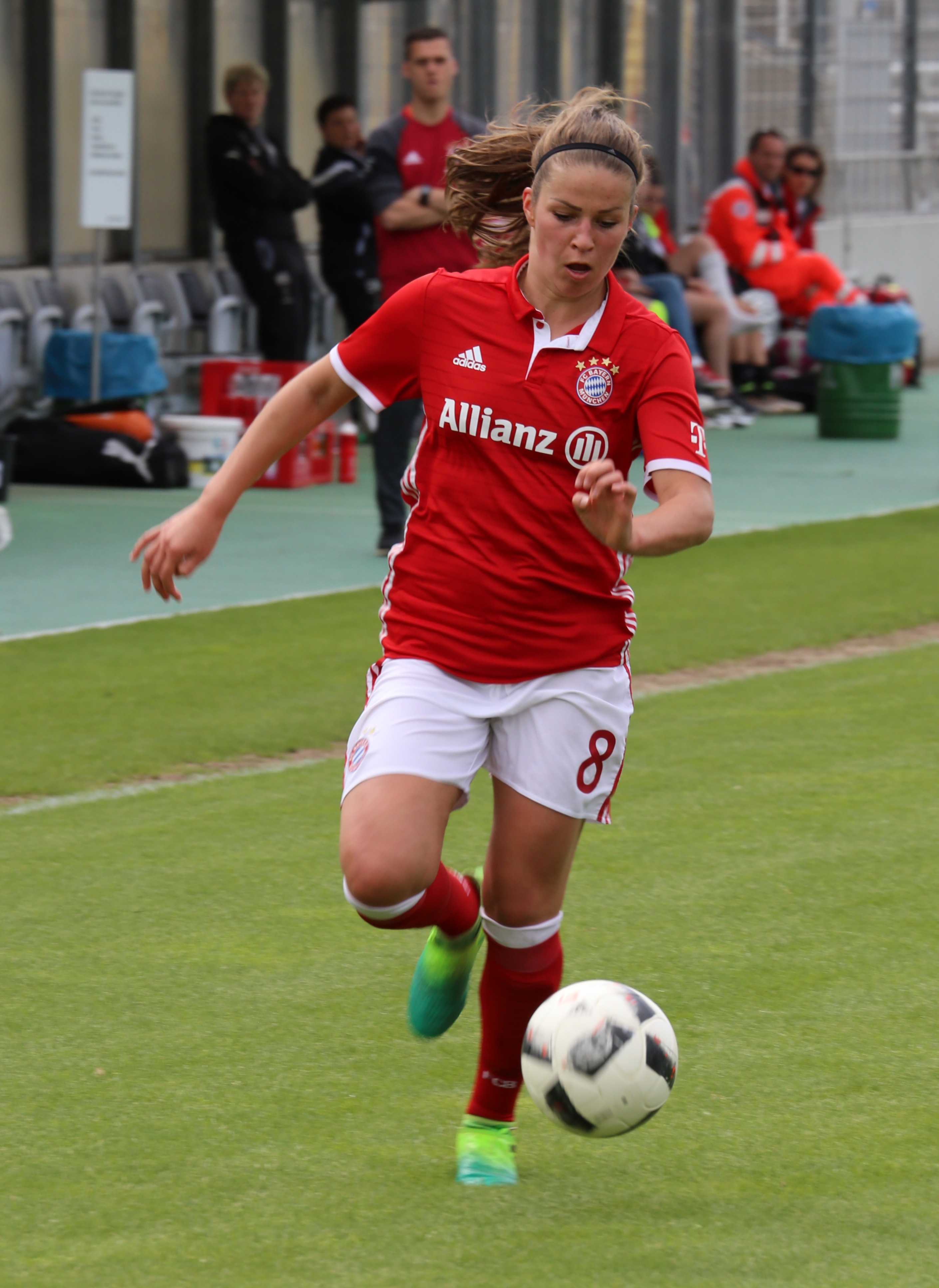 Melanie Leupolz (FC Bayern München) beim Frauen-Bundesliga-Spiel FC Bayern München gegen SGS Essen am 21. Mai 2017 im Stadion an der Grünwalder Straße (Ergebnis war 2:0)